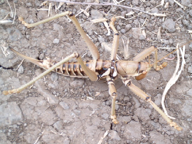 Saga ephippigera syriaca female